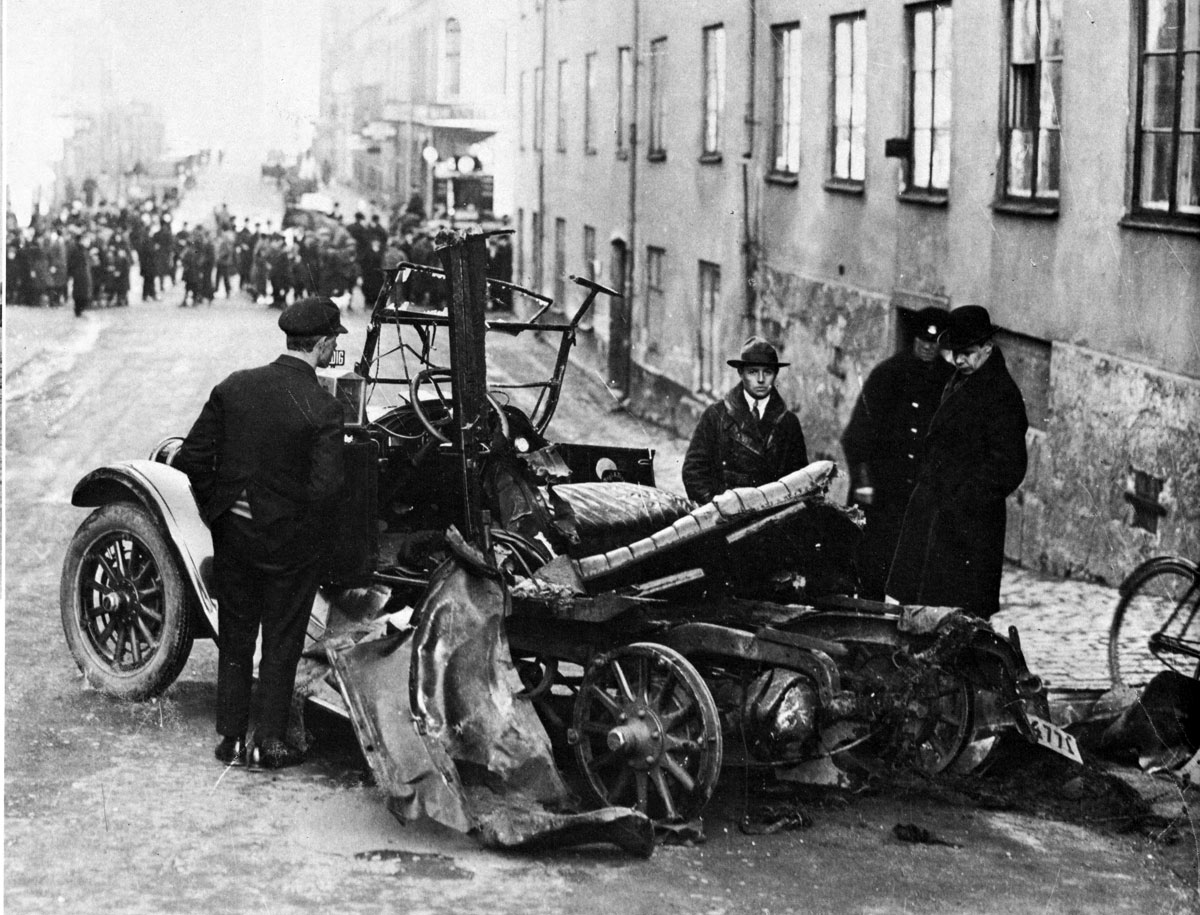 Bombattentat i Stockholm 1926 som dödade Sixten Flyborg